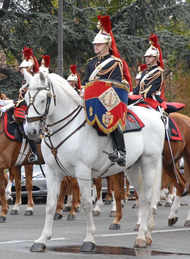 Le Président Hu Jintao à Paris a eu les honneurs de la Garde Républicaine pour arriver à son hôtel avant d'être reçu à l'Elysée, ce qui a provoqué un énorme embouteillage dans le quartier où la circulation a été interdite durant plusieurs heures.